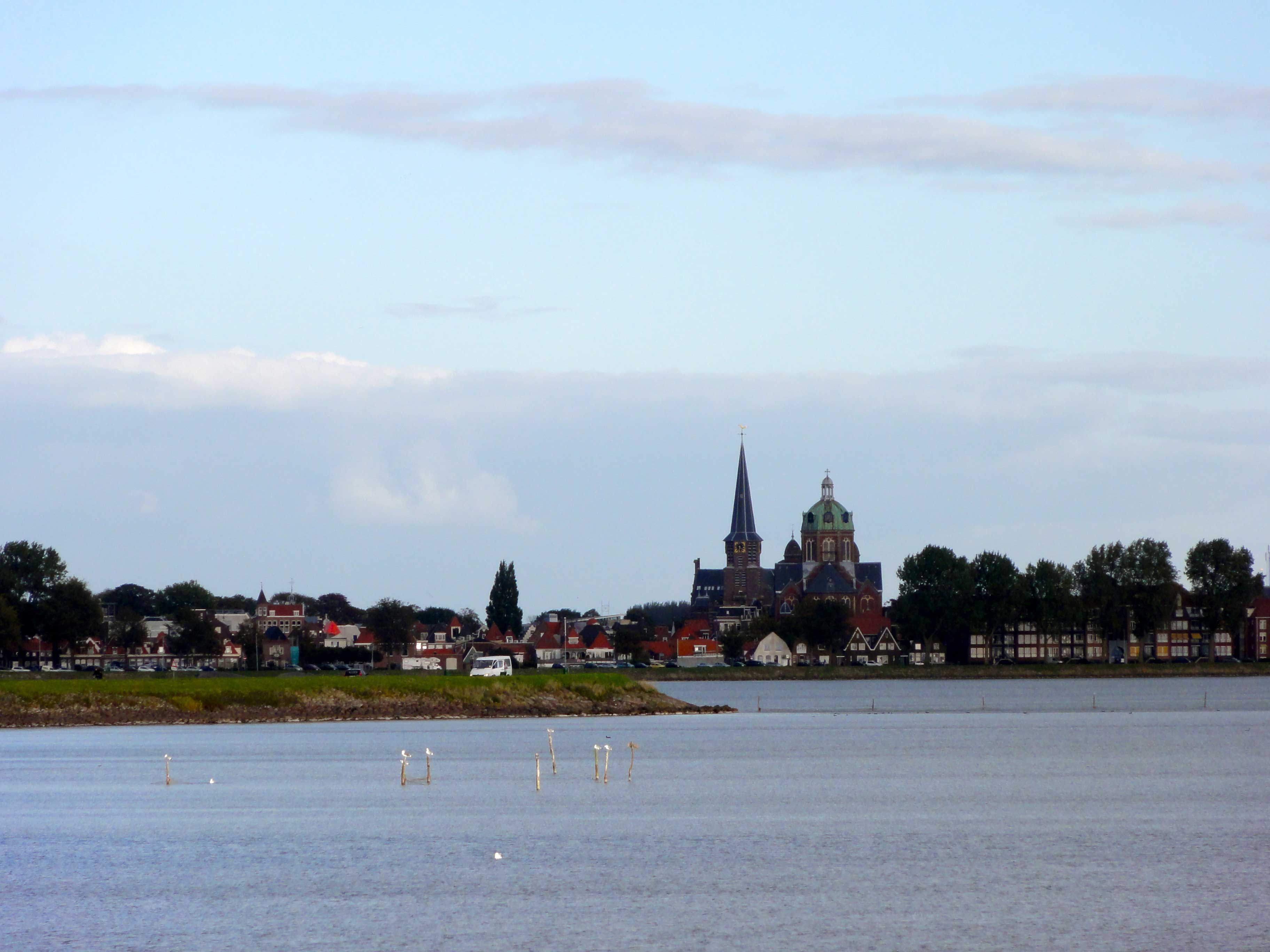 Zicht op Hoorn aan het Hoornse Hop